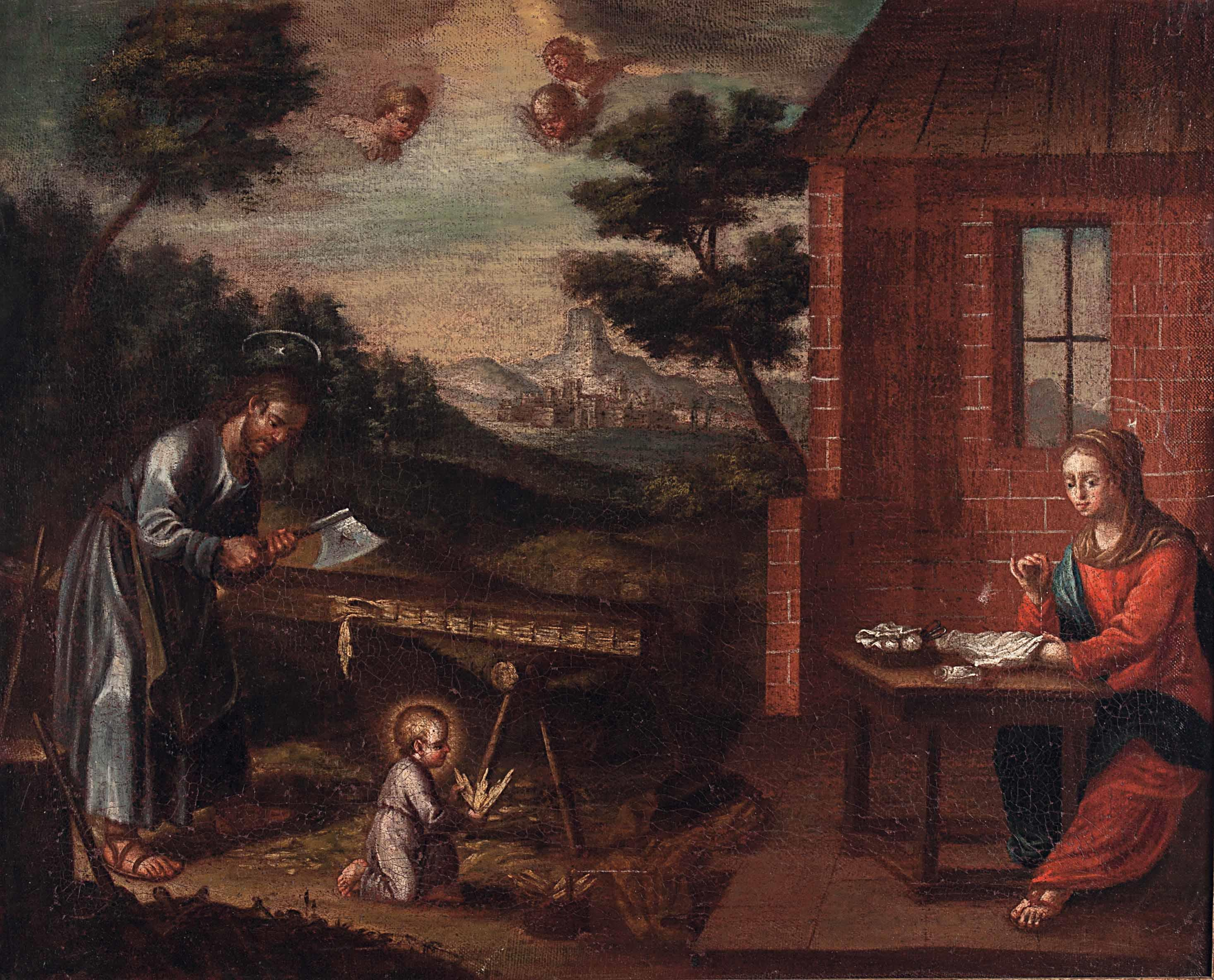 "Die Heilige Familie vor der Schreinerwerkstatt"